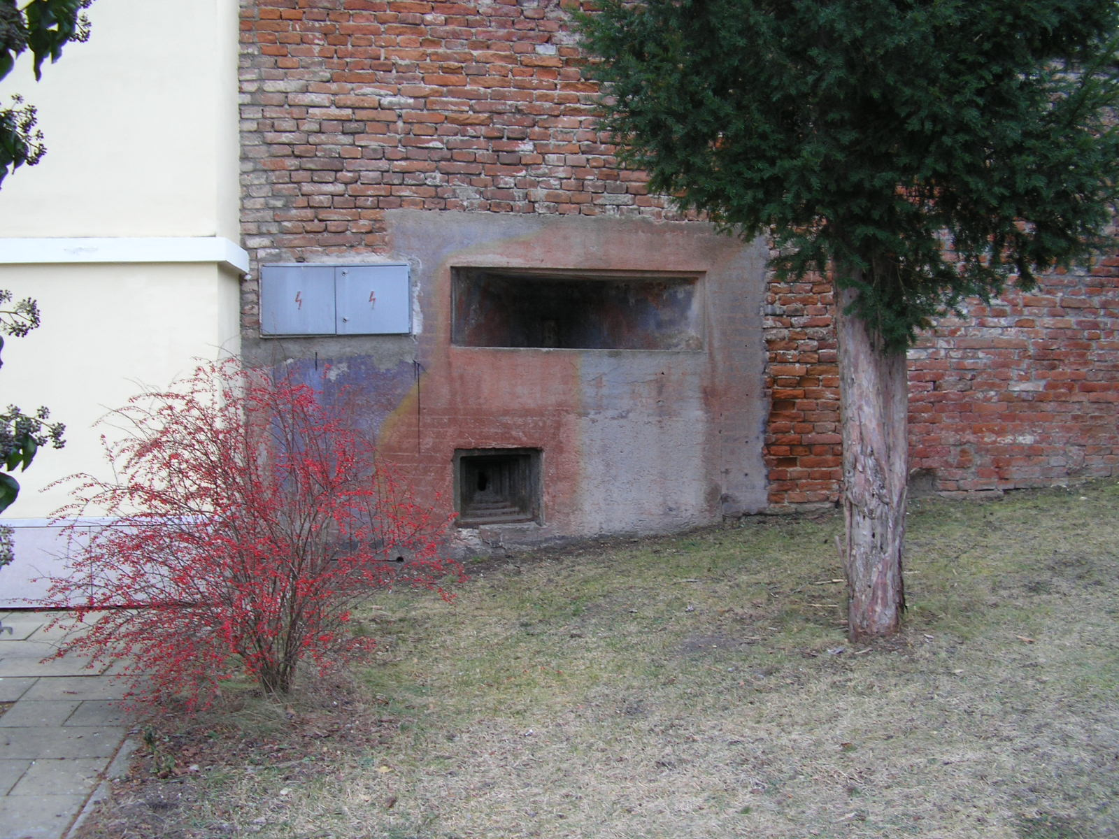 Přistavěné LO vz. 37A-160N k Hraničnímu zámku v Hlohovci